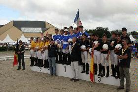 Seleccion española Juvenil